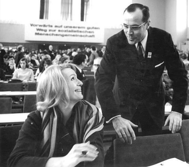 Zentralbild-Spremberg-21.3.1969-Berlin: Kongreß der Nationalen Front des demokratischen Deutschland am 21.3.69 in der Dynamo-Sporthalle. Auf unserem Foto: Prof.Dr. Karl-Heinz Wirzberger, Rektor der Humboldt-Universität zu Berlin, im Gespräch mit der Schauspielerin Inge Keller während einer Konferenzpause.